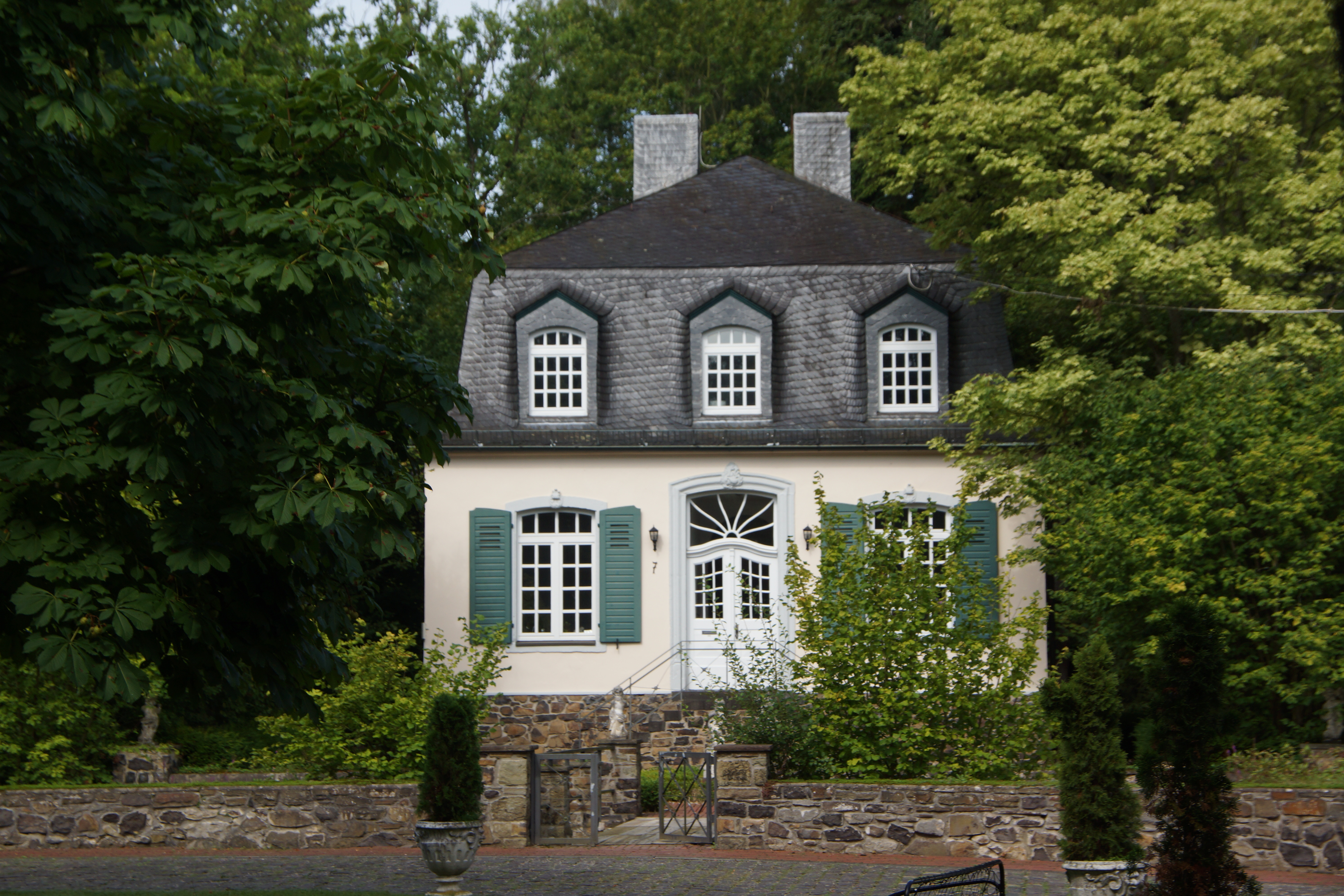 Wasserschlösschen Birlinghoven „Kavaliershaus“ (Schlossstraße 1–7) in Sankt Augustin, Birlinghoven